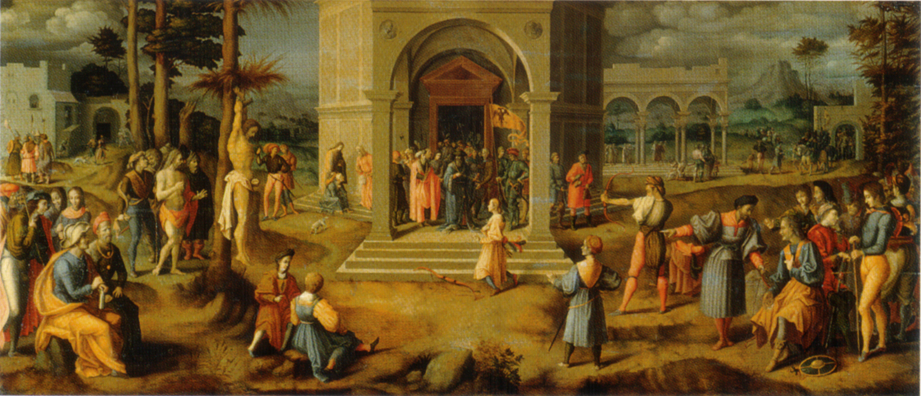 "Das Leichenschießen"